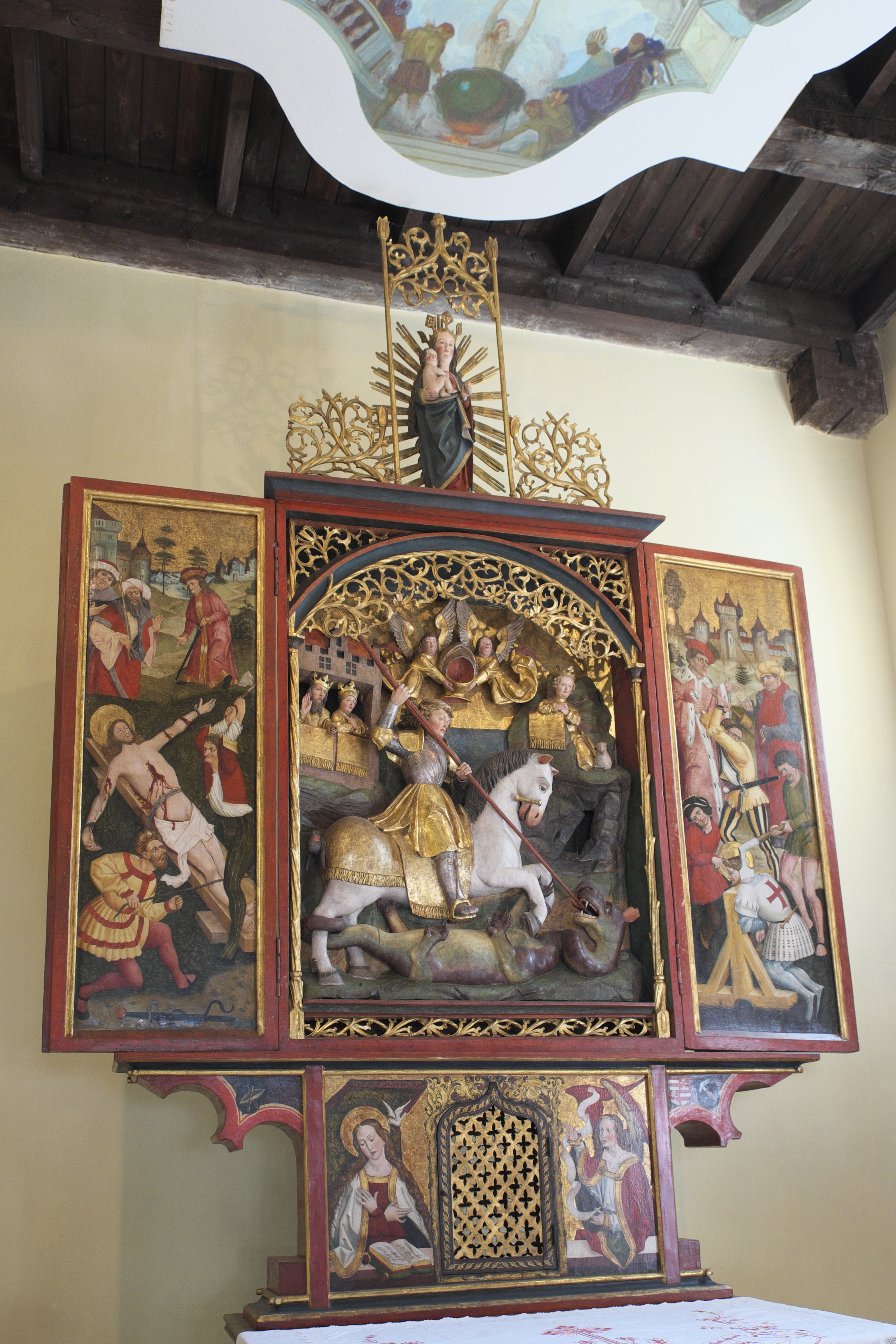 Alt St. Georg in Milbertshofen im Stadtbezirk Milbertshofen-Am Hart in München (Bayern/Deutschland), Georgsaltar von 1510; Innenseite Mitte